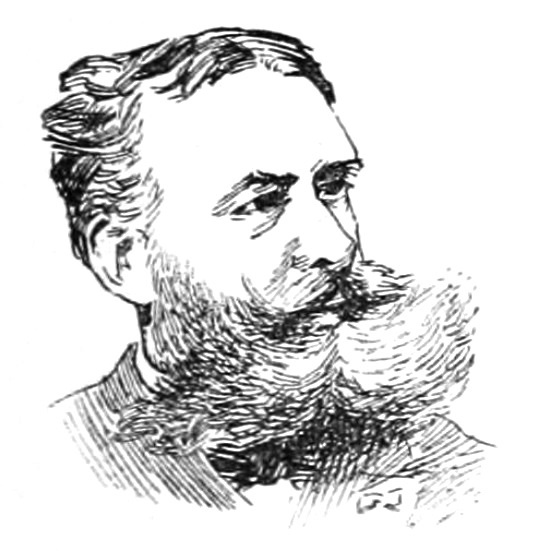 "La Nouvelle Chambre" : "Jaluzot".